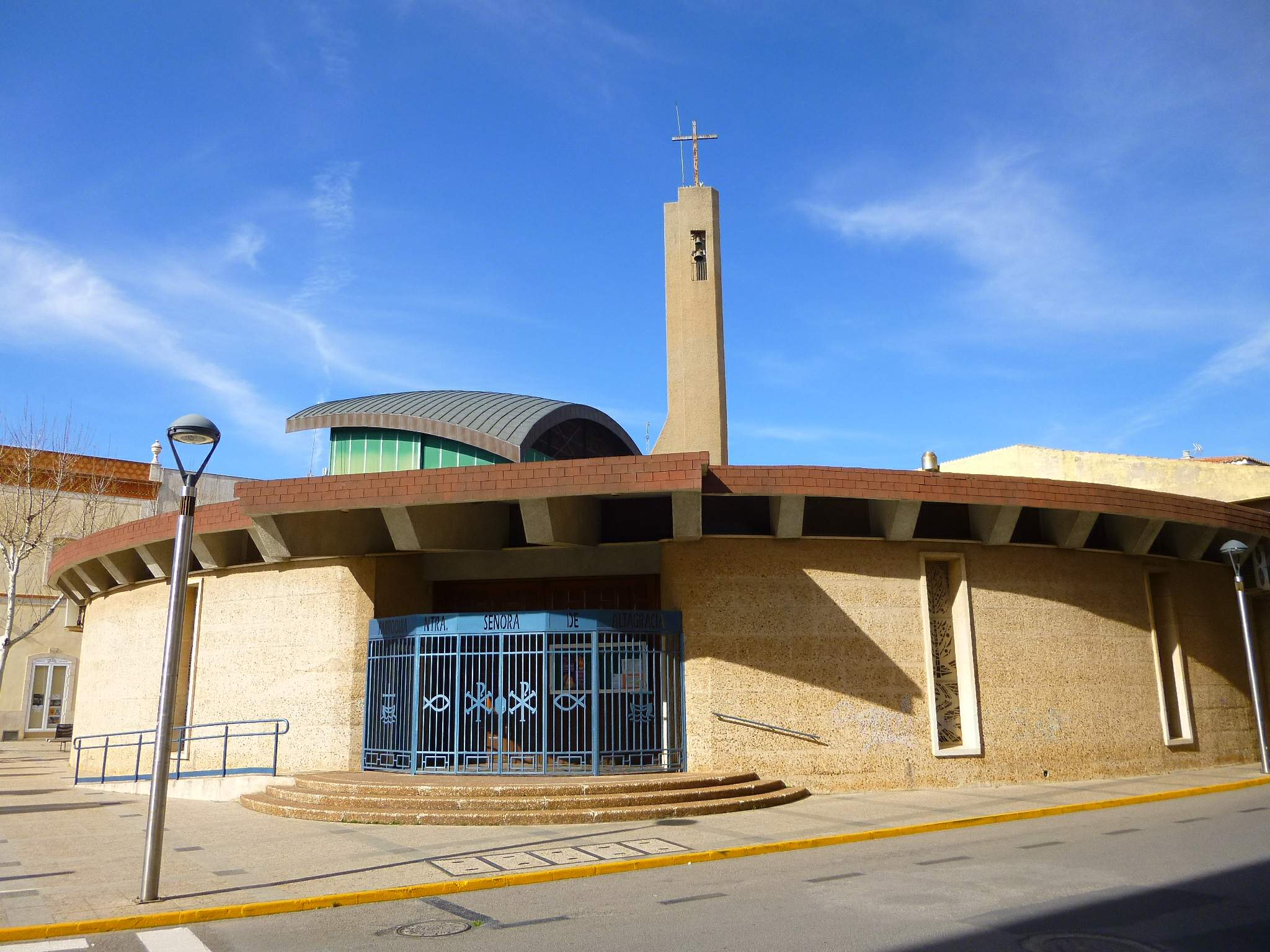 Iglesia de Nuestra Señora de Altagracia (Manzanares, Ciudad Real)